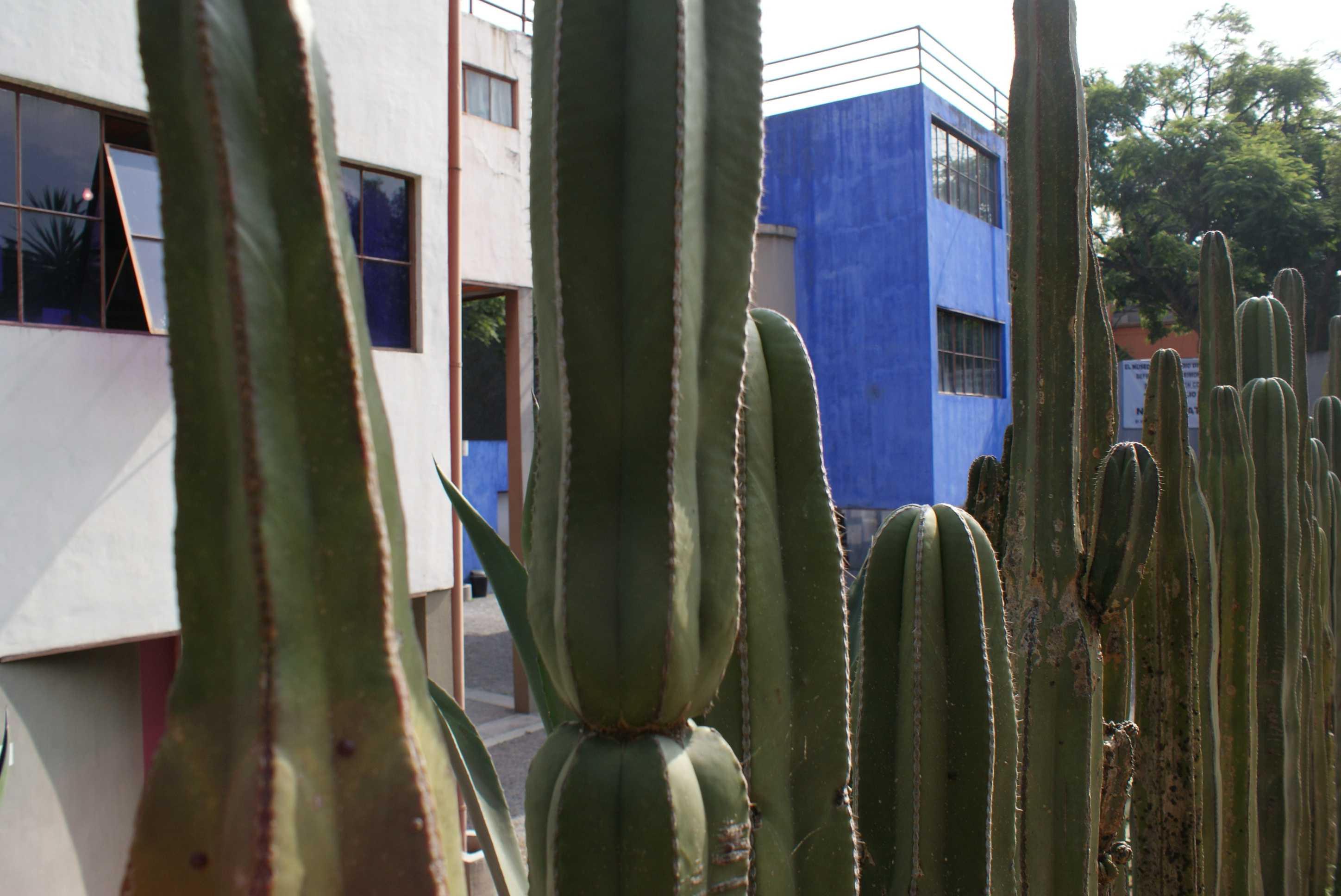 Barda de cactus del exterior del Museo Casa Estudio Diego Rivera y Frida Kahlo fotografiada desde Avenida Altavista. Los cactus se conservan desde la construcción original de las casas.